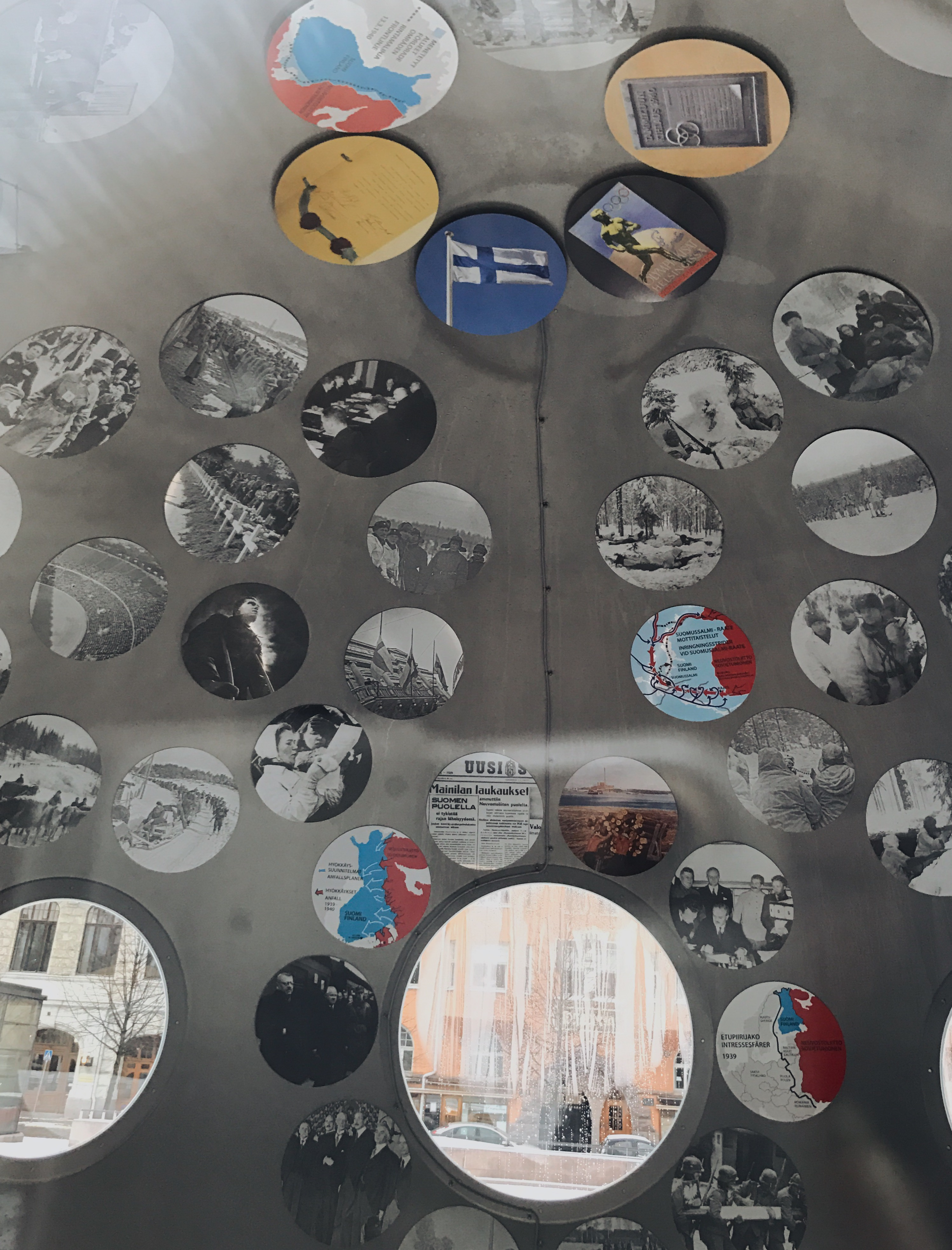 Inuti minnesmärkets klot